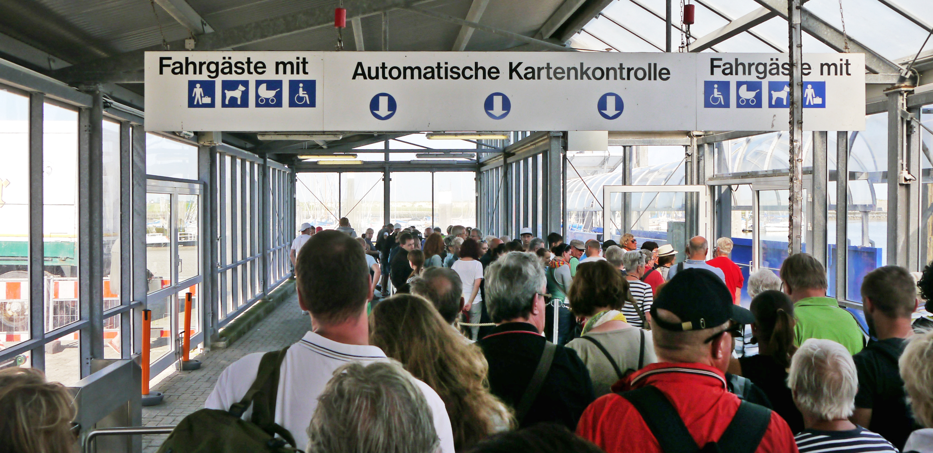 Im Terminal der Personenfähre in Bensersiel drängeln sich die Tagestouristen nach Langeoog.